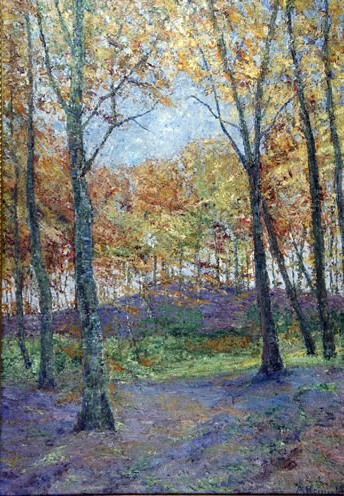 Küstenwald. Öl, 83 x 60 cm